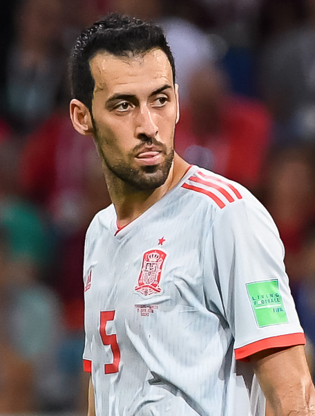 Хет-трик Роналду приносит Португалии ничью в пиренейском дерби